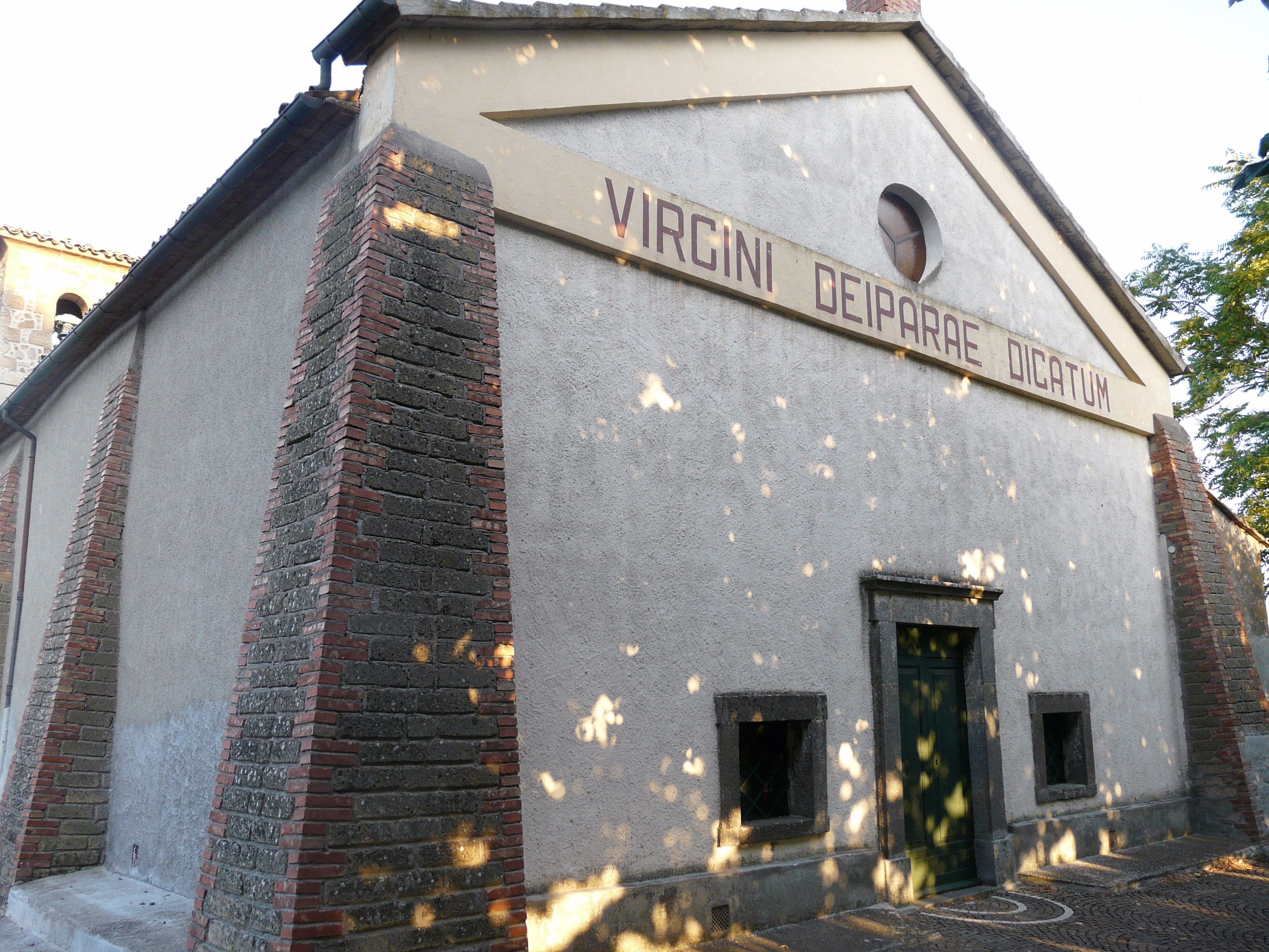 Chiesa di Torano, San Lorenzo Nuovo, Lazio, Italia